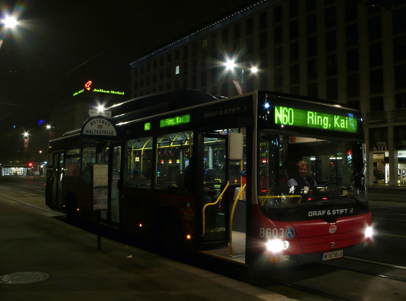 Nightline auf der Linie N60